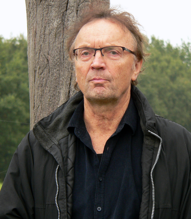 Wolfgang Jürries am Woodhenge bei Restorf